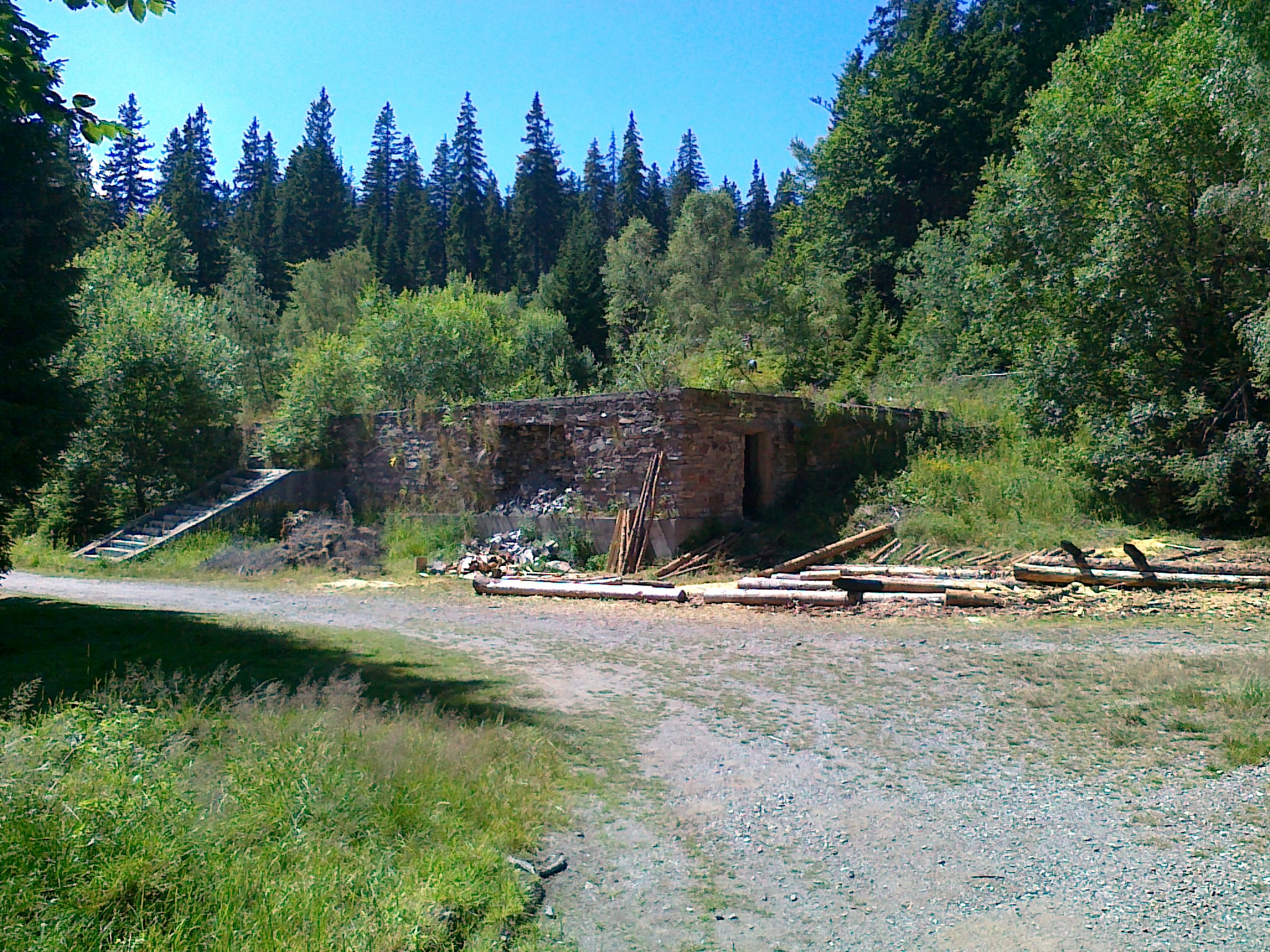 Ruiny spalonego schroniska Chata Alfrédka przy skrzyżowaniu Alfrédka